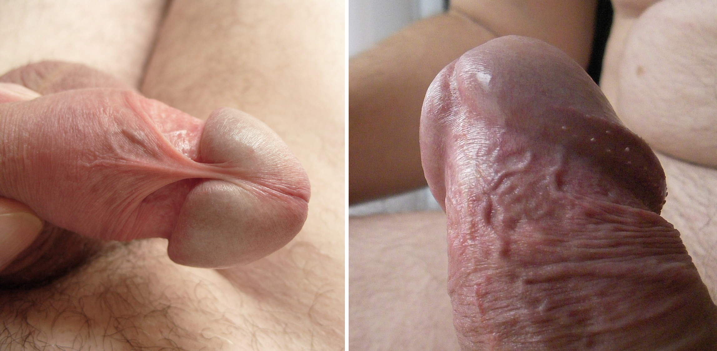 Penis mit Vorhautbändchen und Erektion ohne Vorhautbändchen